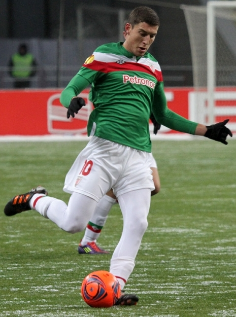 Оскар де Маркос в составе "Атлетика Бильбао".